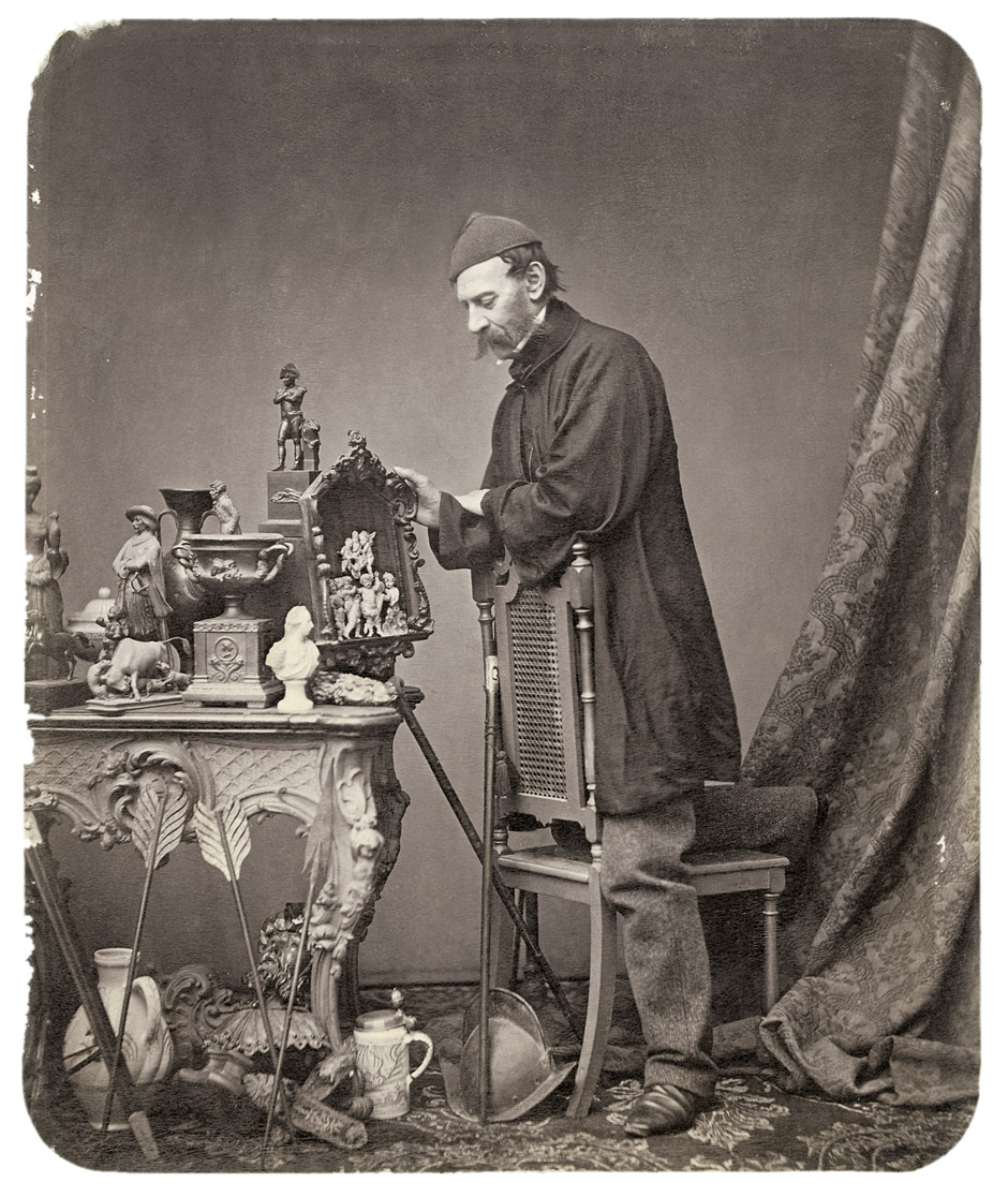 Studio portrait of an antique dealer